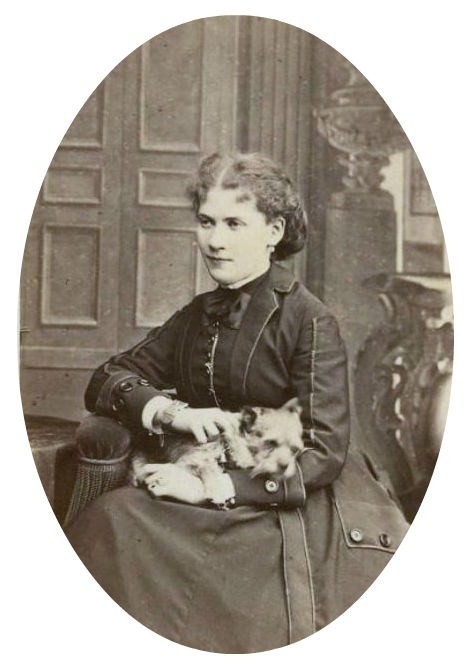 Мария Николаевна Струве, ур. Анненкова (1844—1889)